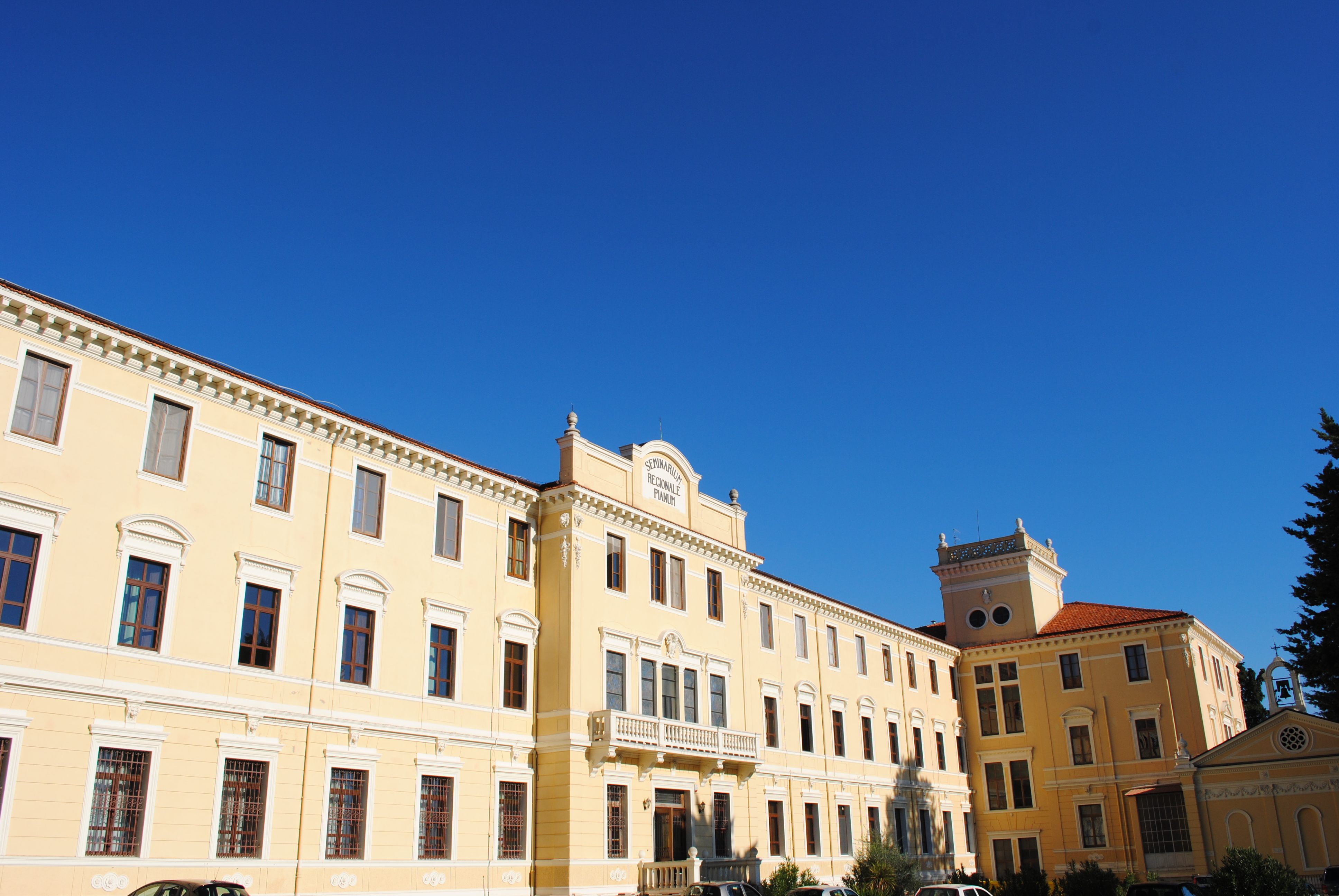 Facciata principale del Pontificio Seminario Regionale "San Pio X" di Chieti